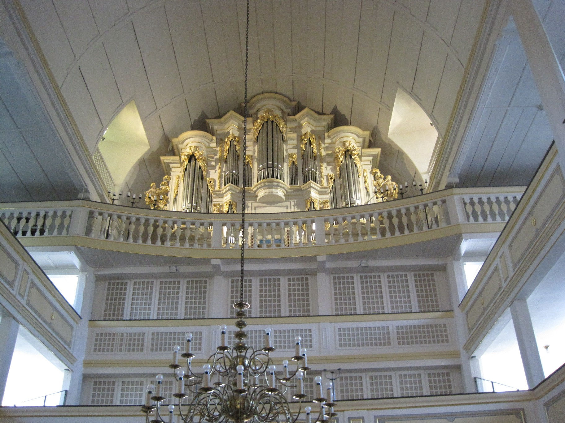 Die Wender- und Steinmeyer-Orgel der Bachkirche in Arnstadt